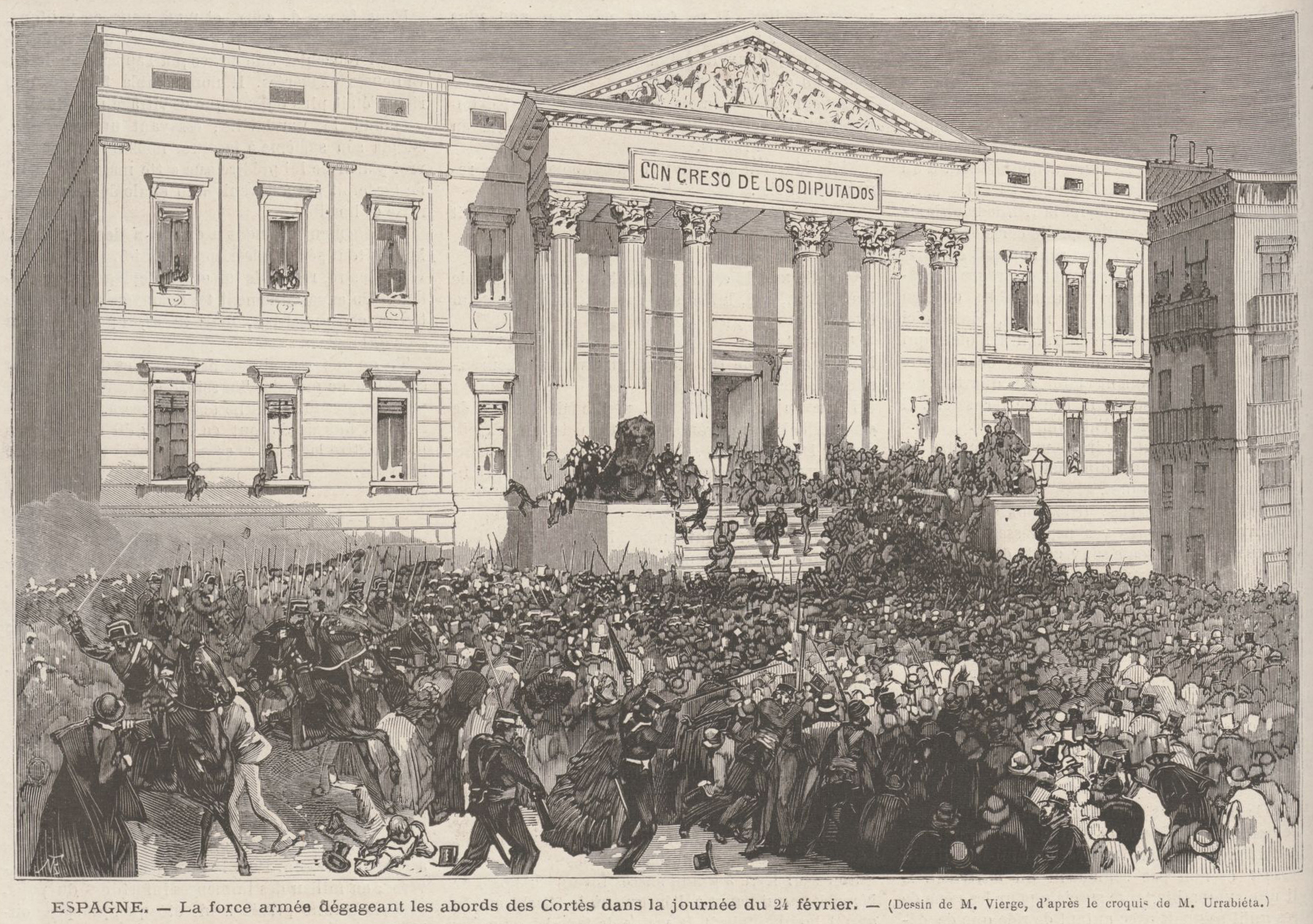 Espagne. — La force armée dégageant les abords des Cortes dans la journée du 24 février. — (Dessin de M. Vierge, d'après le croquis de M. Urrabieta.)